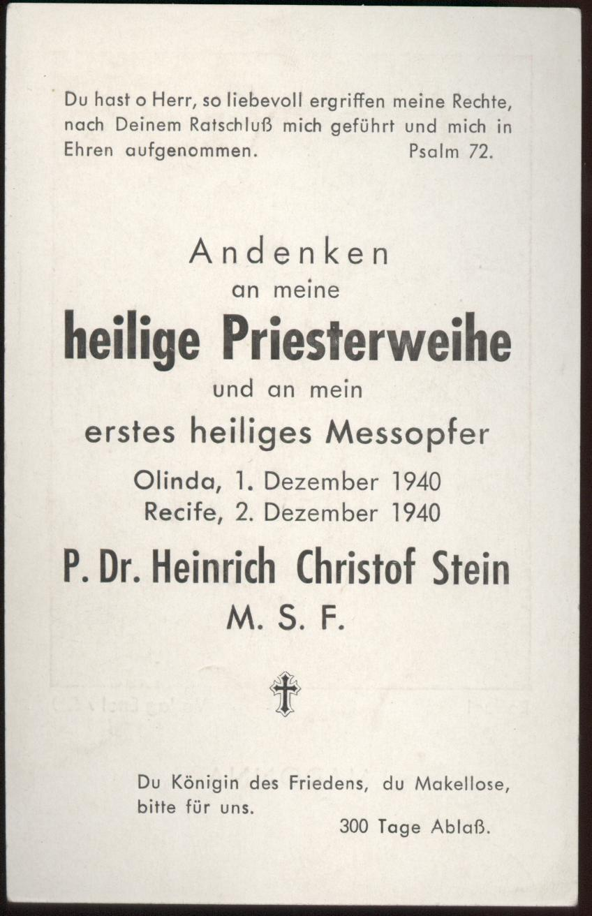 Primizbildchen Pater Heinrich Stein, Brasilien, Grünstadt, Pfalz